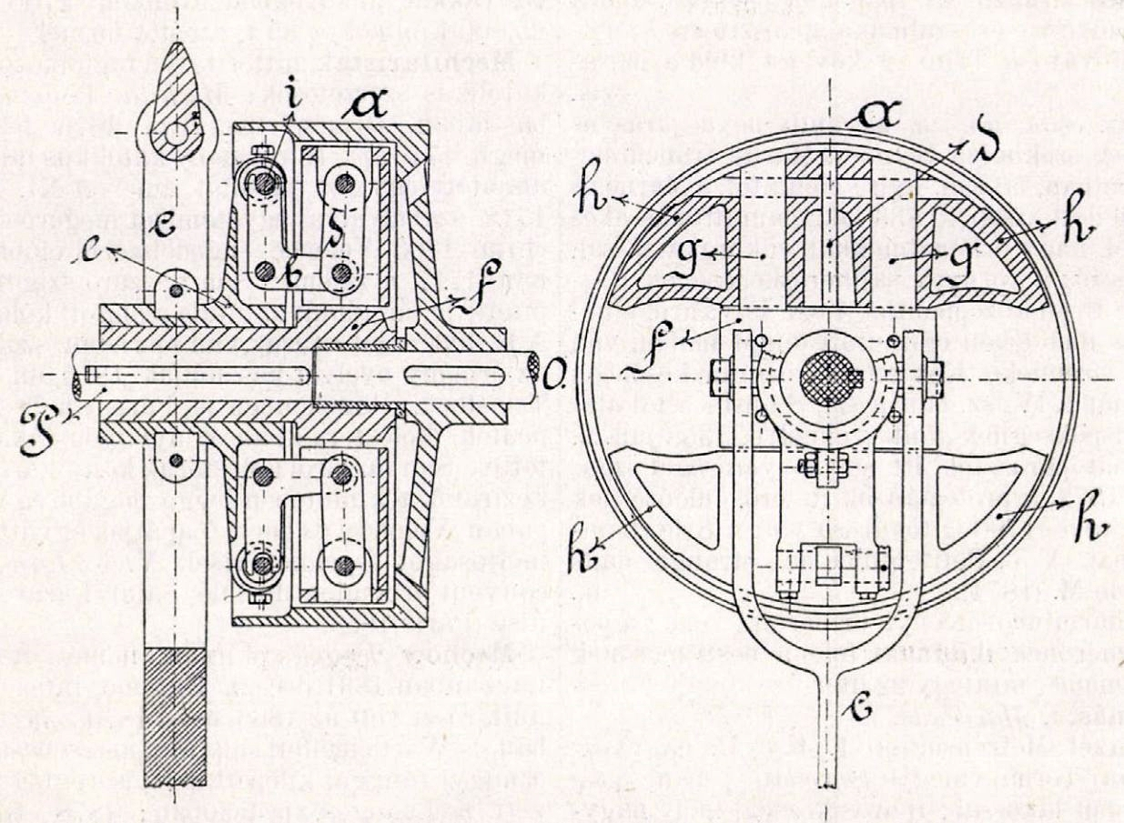 Mechwart-féle tengelykapcsoló keresztmetszete